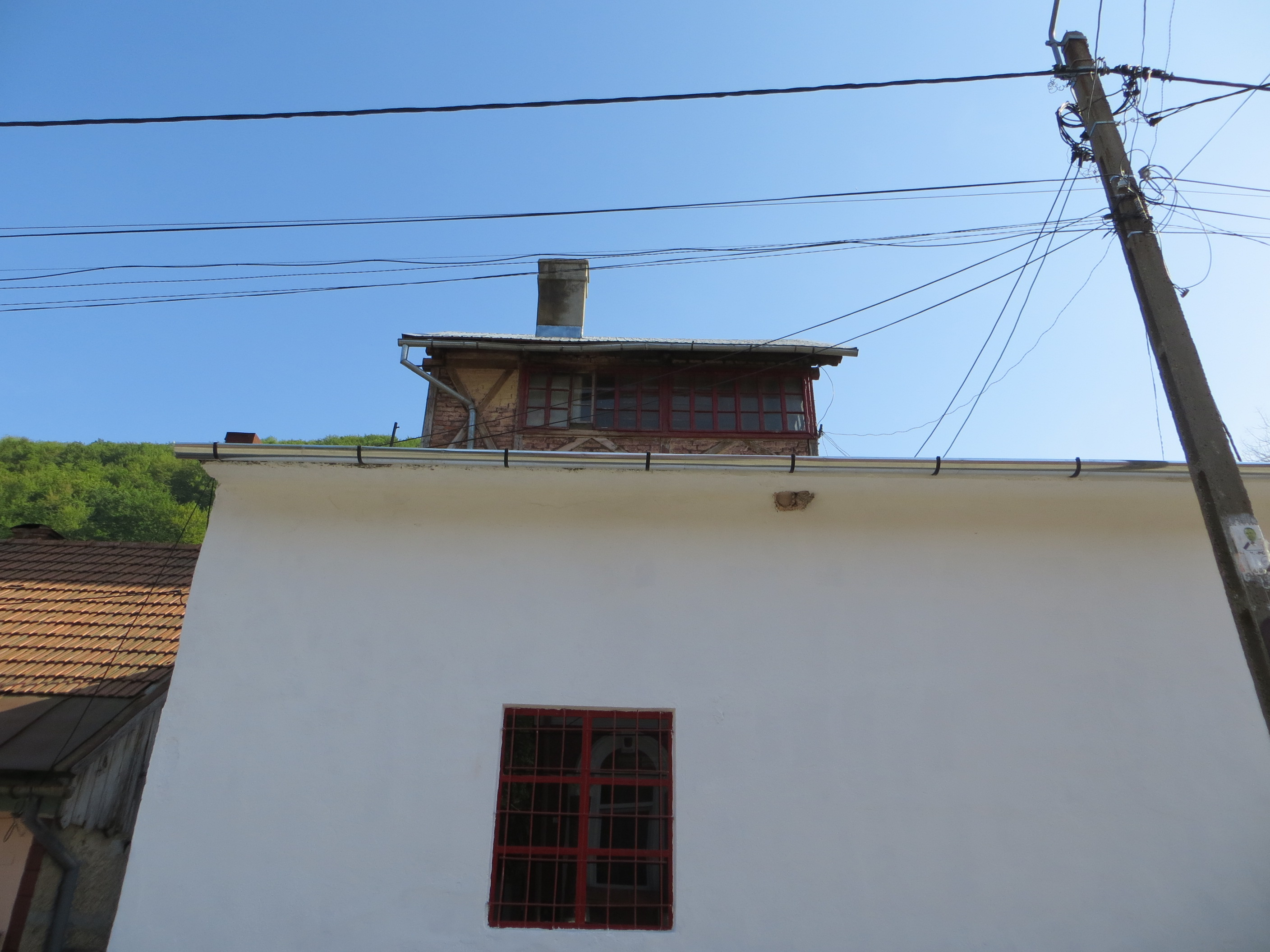 Turnul de explozivi 02